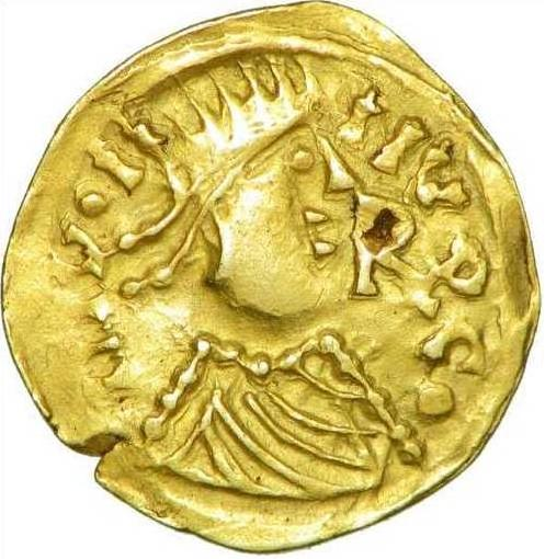 Triens de Judicaël frappé à Redonis (Rennes). Buste diadémé à droite, devant le profil, R ; légende autour : IIIV.II - IVVC.. Triens de poids lourd, sur un flan large, en bon or. Types de droit et de revers complets et bien frappés. Un léger défaut est à signaler dans la boucle du R devant le visage, ainsi qu’un infime éclatement de métal en bord de flan visible entre 7 et 8 heures au droit.